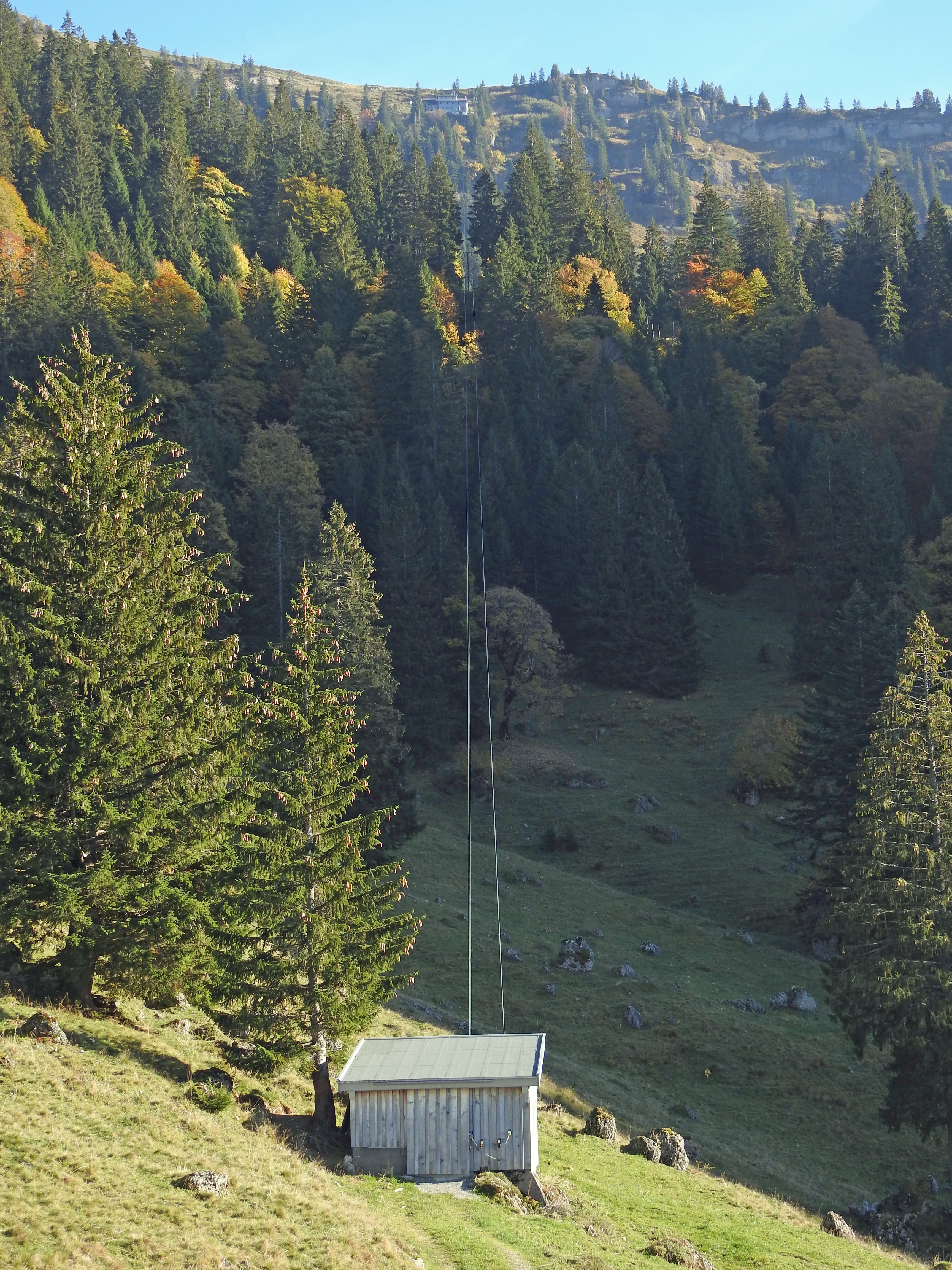 Materialseilbahn zum Staufner Haus (Berghütte)